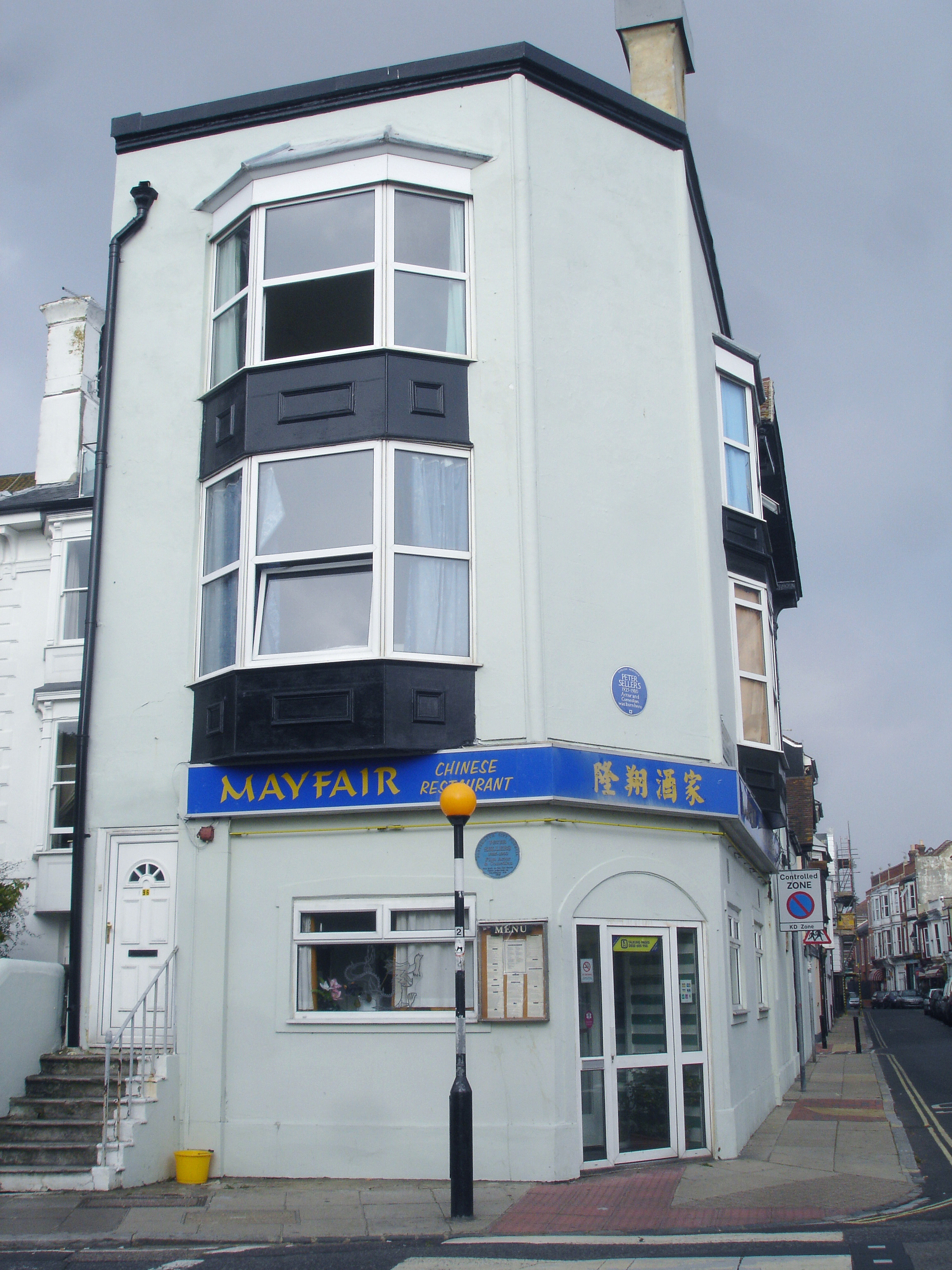 Own work